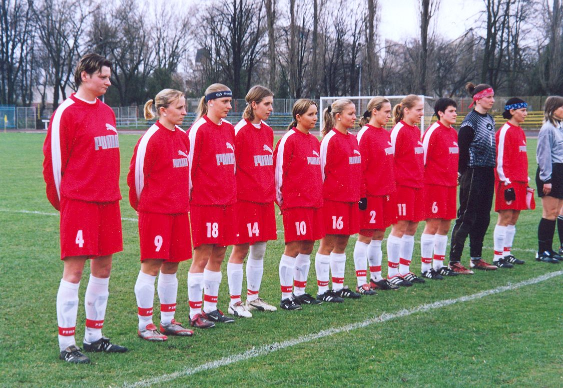 Reprezentacja Polski w piłkę nożną kobiet w 2004 r. przed meczem z Ukrainą